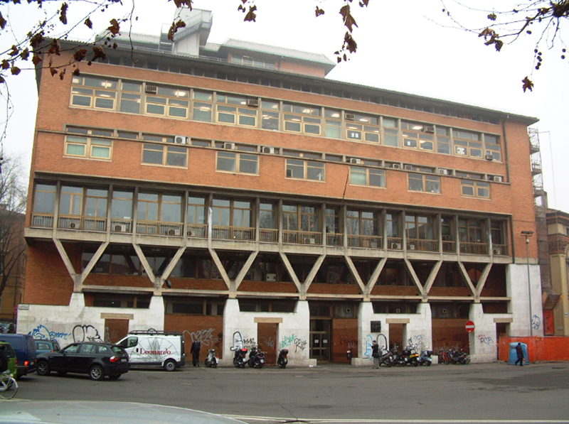 Sede dell'UMI in Piazza Porta San Donato 5 Bologna (IT)